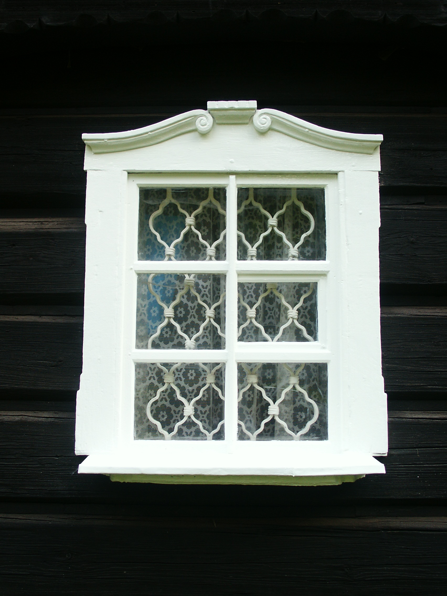 Venkovská usedlost, Dlouhý Důl 5, Dlouhý Důl - okno.